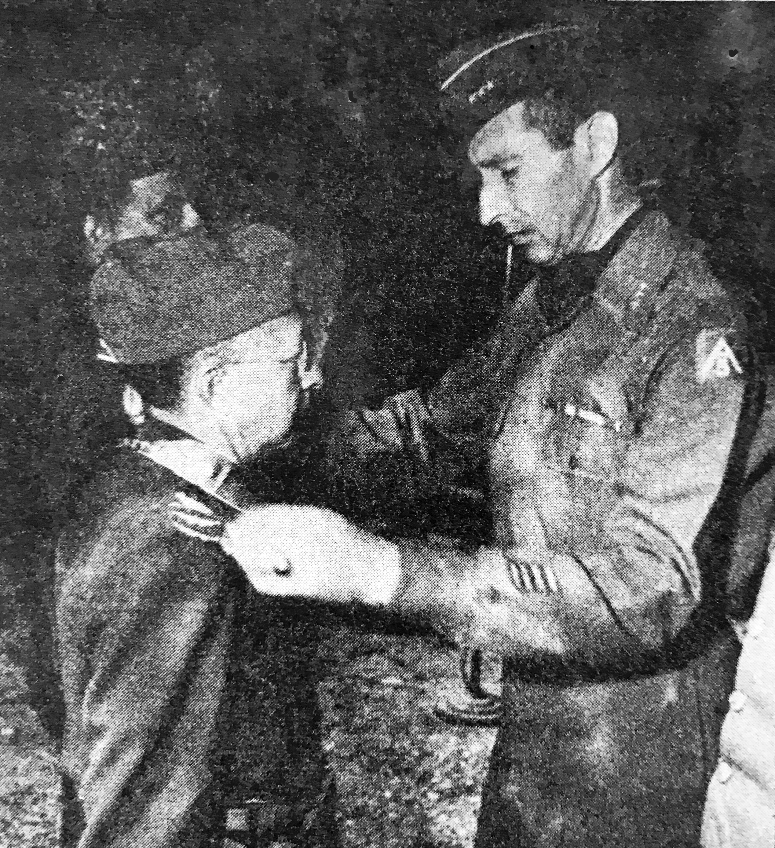 Mascarenhas de Moraes, in Italia, ricevendo la medaglia al valore militare dal Generale Mark W.Clark, allora Comandante della V Armata Americana (archivio del generale Heleno Soares Castellar, Revista do Exército Brasileiro, Biblioteca do Exército, Rio de Janeiro, v. 120, n°4, outubro/novembro 1983, pg. 225